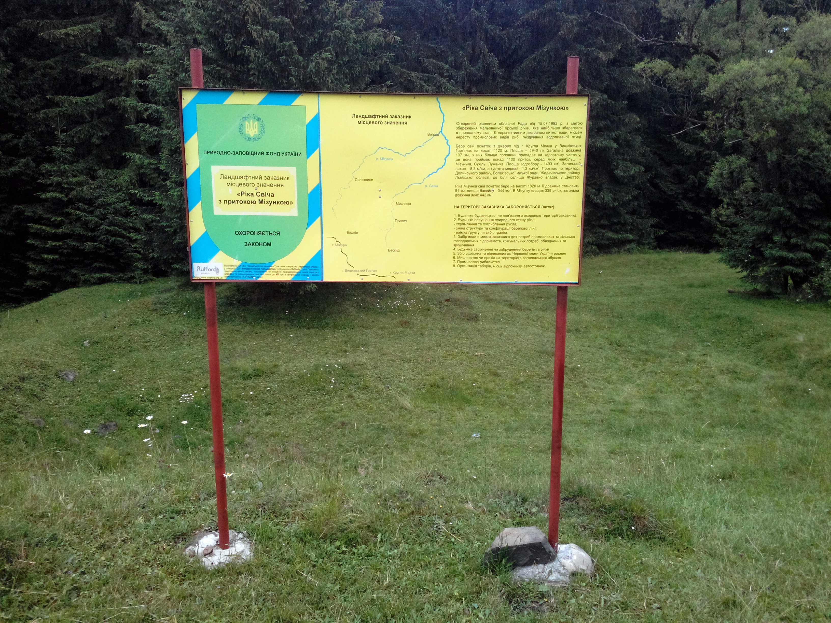 Інформаційно-охоронна таблиця біля присілку Людвиківка